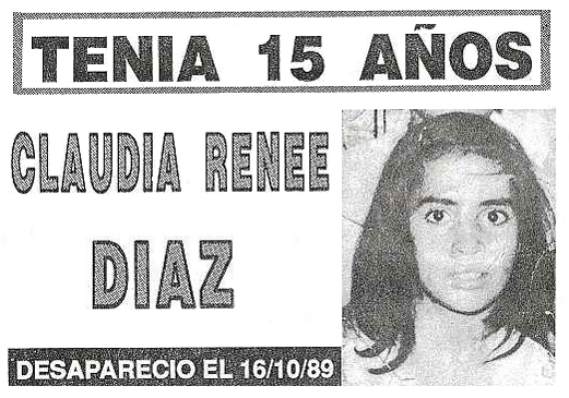 Panfleto repartido en la época.